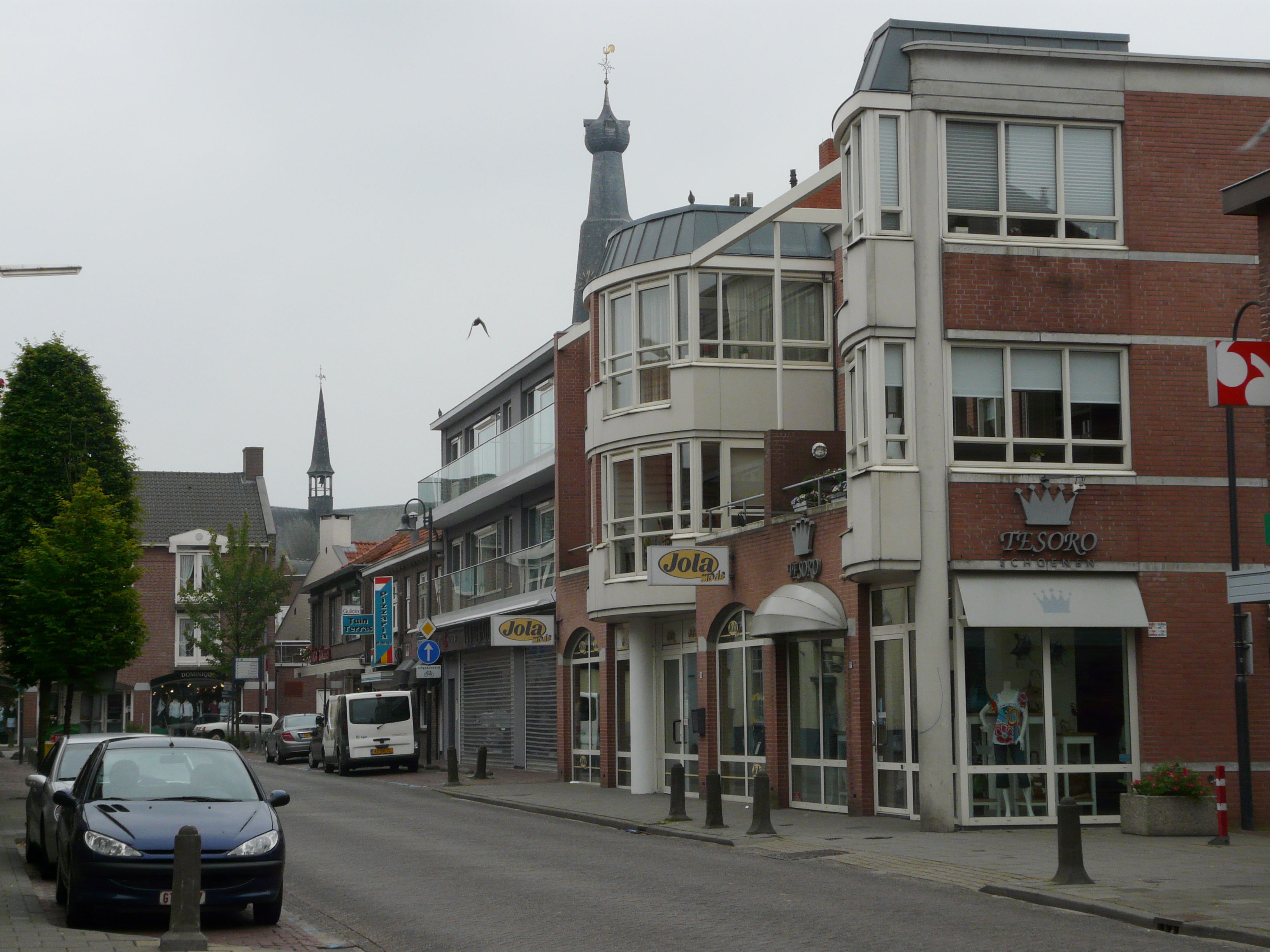 Zicht op een deel van de Nieuwstraat in Baarle-Nassau